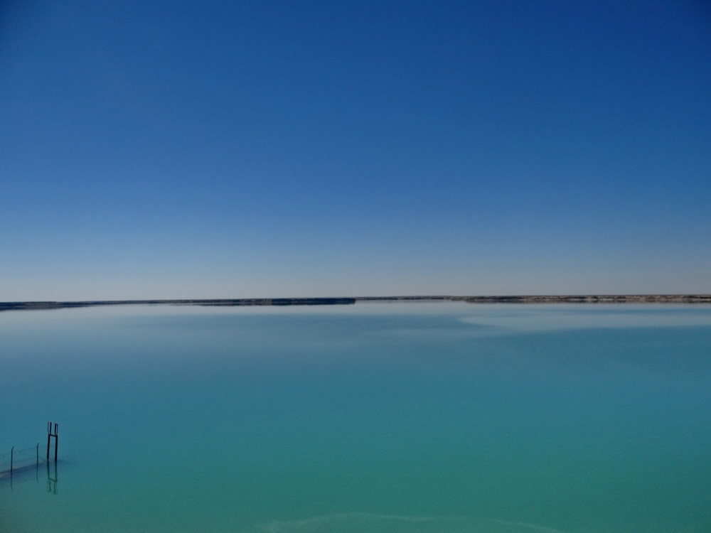 چاه نیمه